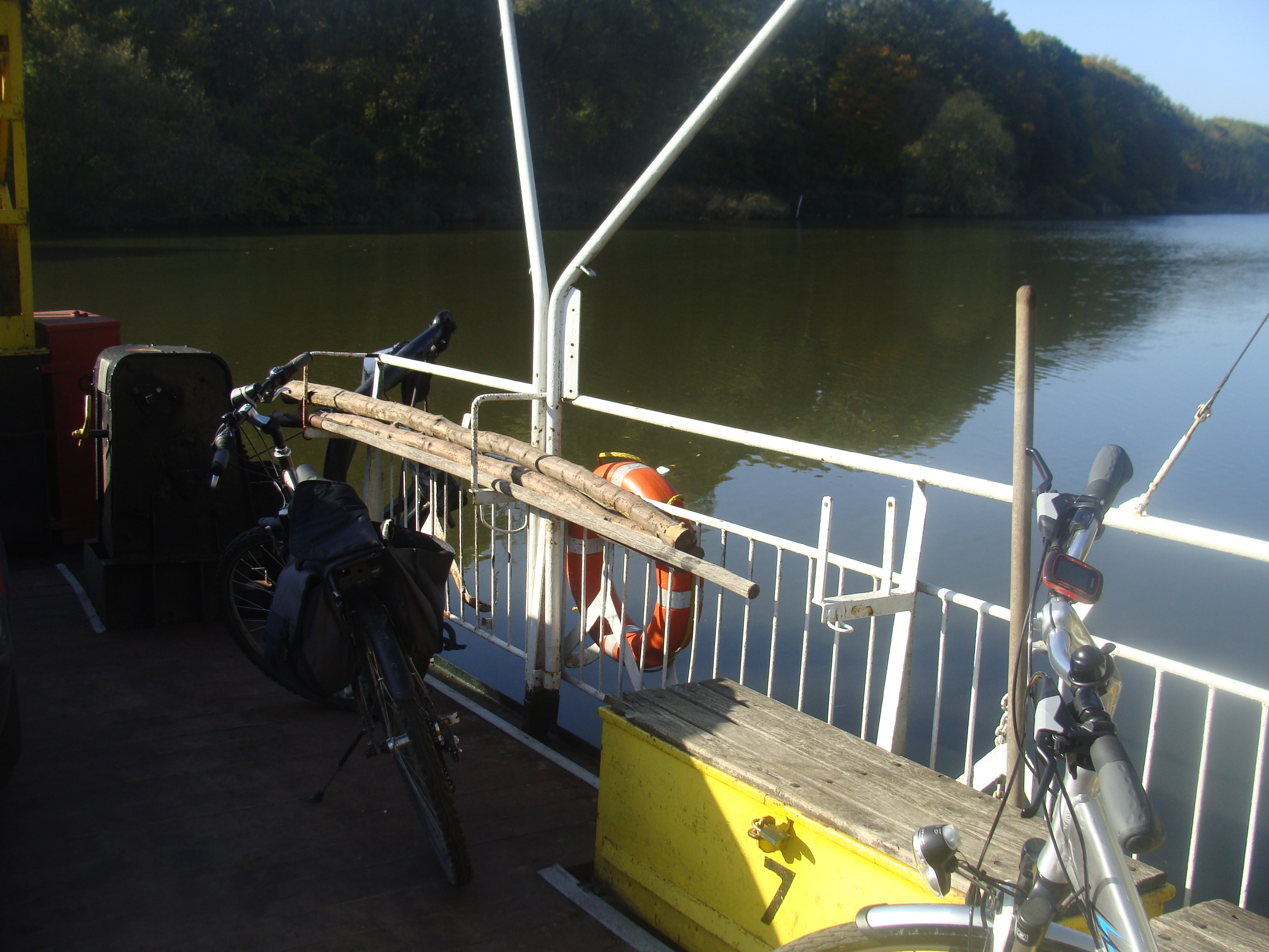 Prom osobowy na rzece Odrze w Zdzieszowicach